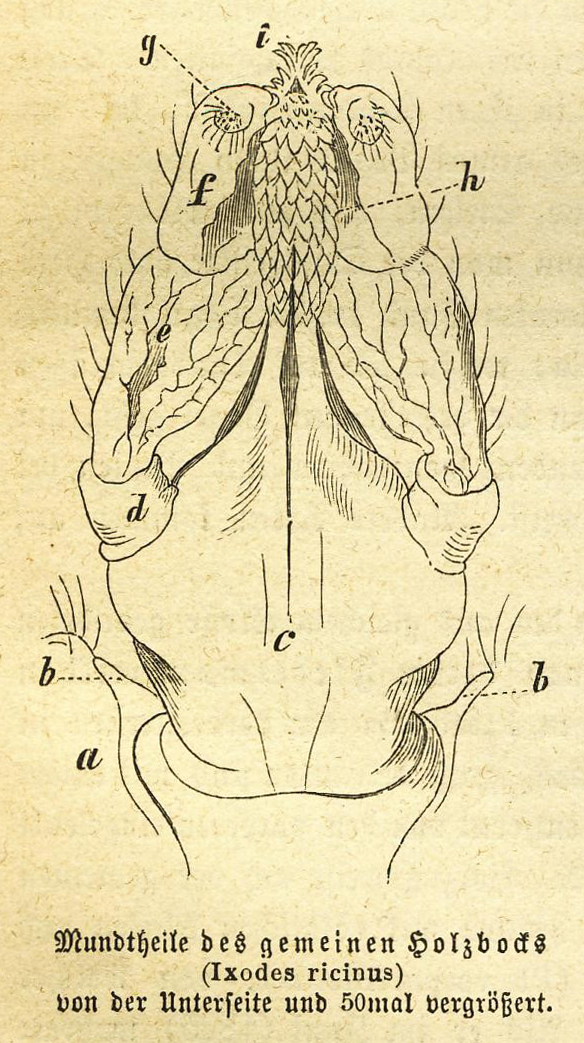 Mundwerkzeug des gemeinen Holzbocks